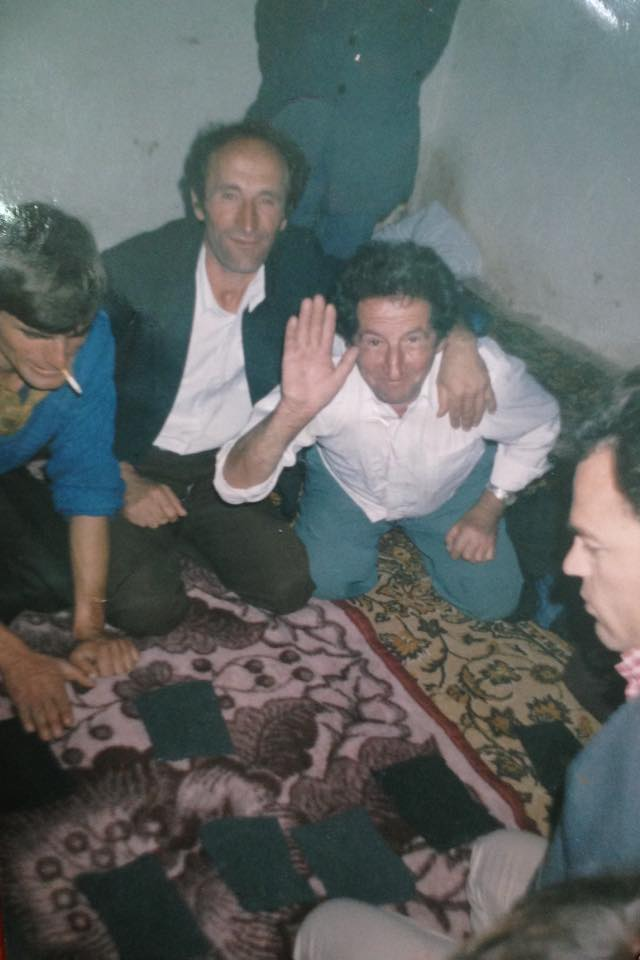 Loja e kapuqave ne dasem